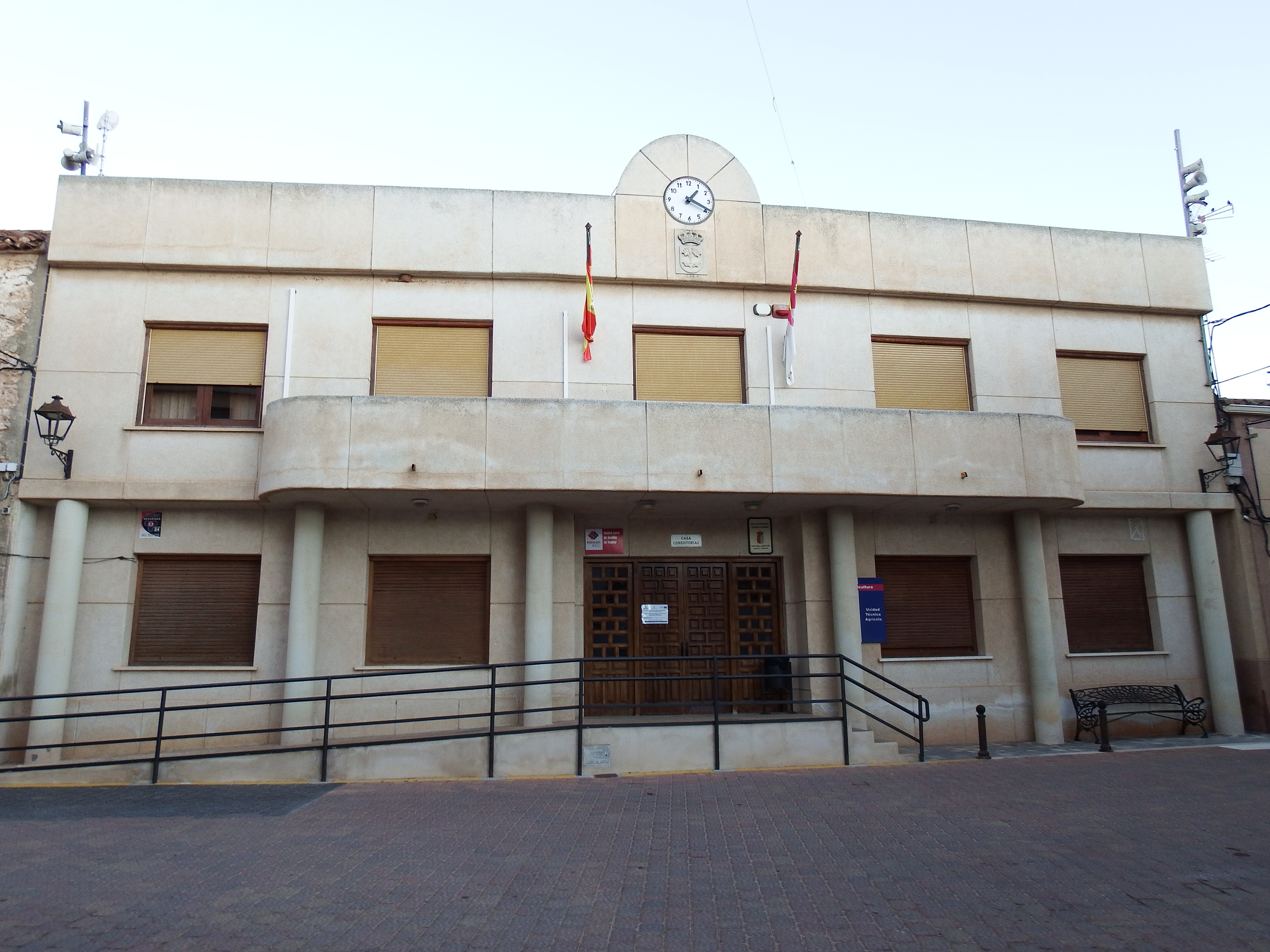 Pozohondo